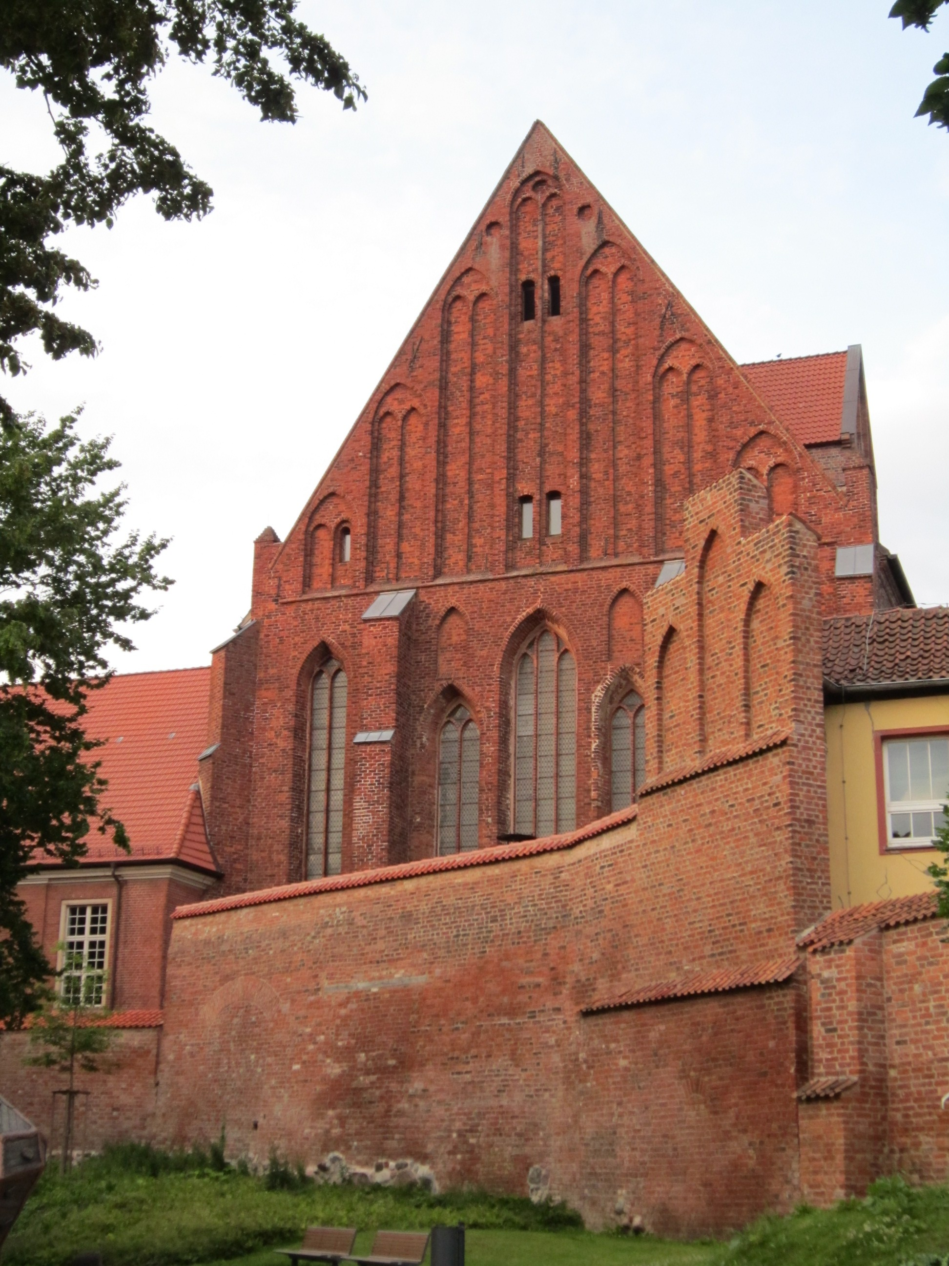 Westseite der ehemaligen Katharinenkirche (heute Deutsches Meeresmuseum) hinter der Stralsunder Stadtmauer